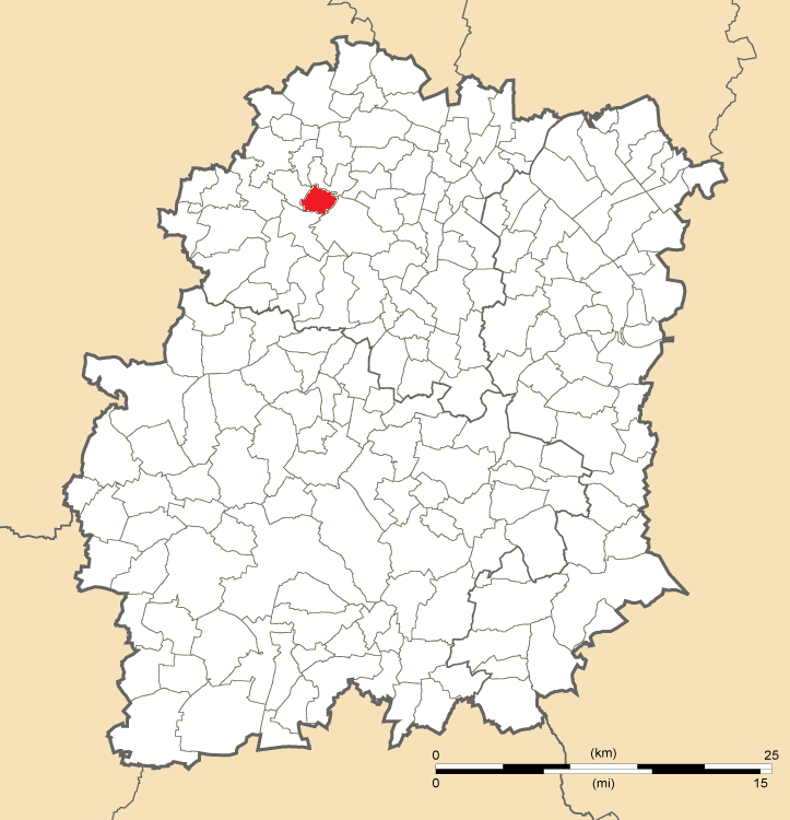 Carte de position de Saint-Jean-de-Beauregard en Essonne (91)